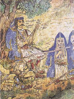 «Ο ατρόμητος Κατσαντώνης» παίζει τον ταμπουρά του. Λεπτομέρεια από τοιχογραφία του Θεόφιλου.